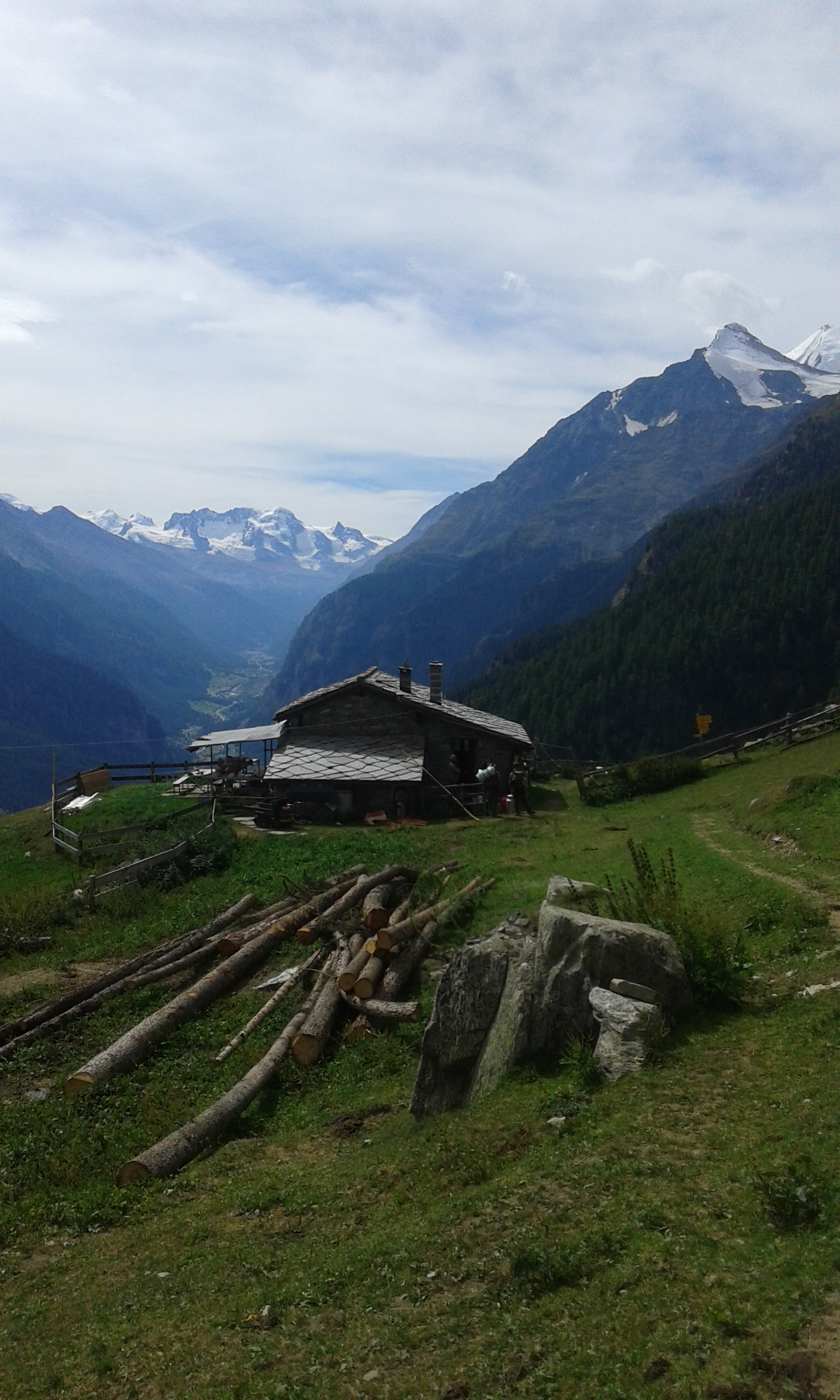 Die Sennhütte der Alp Jungen (Jungeralp) oberhalb St. Niklaus Dorf. Rechts Brunegghorn und Flanke des Weisshorns. Im Hintergrund von rechts Klein Matterhorn, Breithorn, Pollux und Castor.